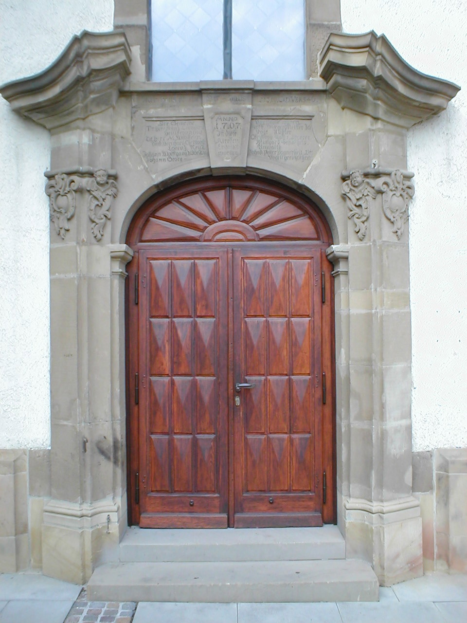 Hauptportal der Peterskirche in Neckargartach, datiert 1767